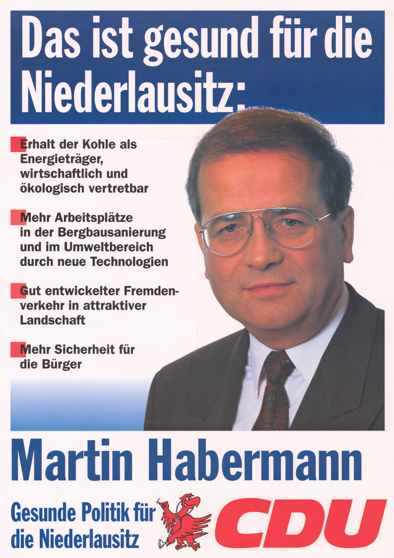 Das ist gesund für die Niederlausitz: . Erhalt der Kohle als Energieträger, wirtschaftlich und ökologisch vertretbar . Mehr Arbeitsplätze in der Bergbausanierung und im Umweltbereich durch neue Technologien . Gut entwickelter Fremdenverkehr in attraktiver Landschaft . Mehr Sicherheit für die Bürger Martin Habermann Gesunde Politik für die Niederlausitz CDUAbbildung:PorträtfotoPlakatart:Kandidaten-/Personenplakat mit PorträtObjekt-Signatur:10-033 : 230Bestand:Landtagswahlplakate Brandenburg (10-033)GliederungBestand10-18:Landtagswahlplakate Brandenburg (10-033) » CDULizenz:KAS/ACDP 10-033 : 230 CC-BY-SA 3.0 DE